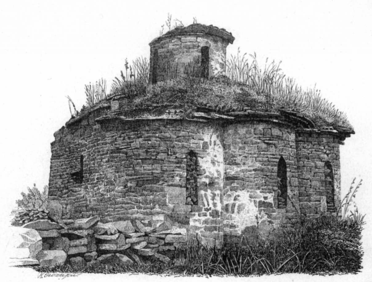 3-я древне-христианская церковь, находящ. в Зеленчукском ущелии. Вид с юго-восточн. стор.